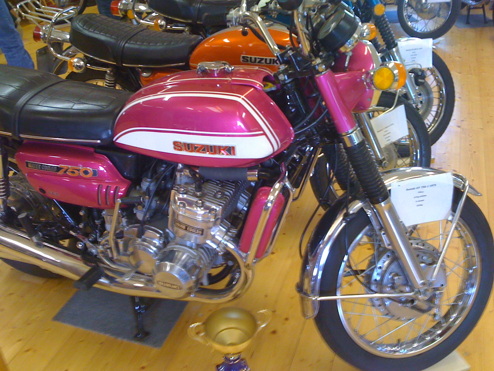 Museum beauties - Suzuki GT750